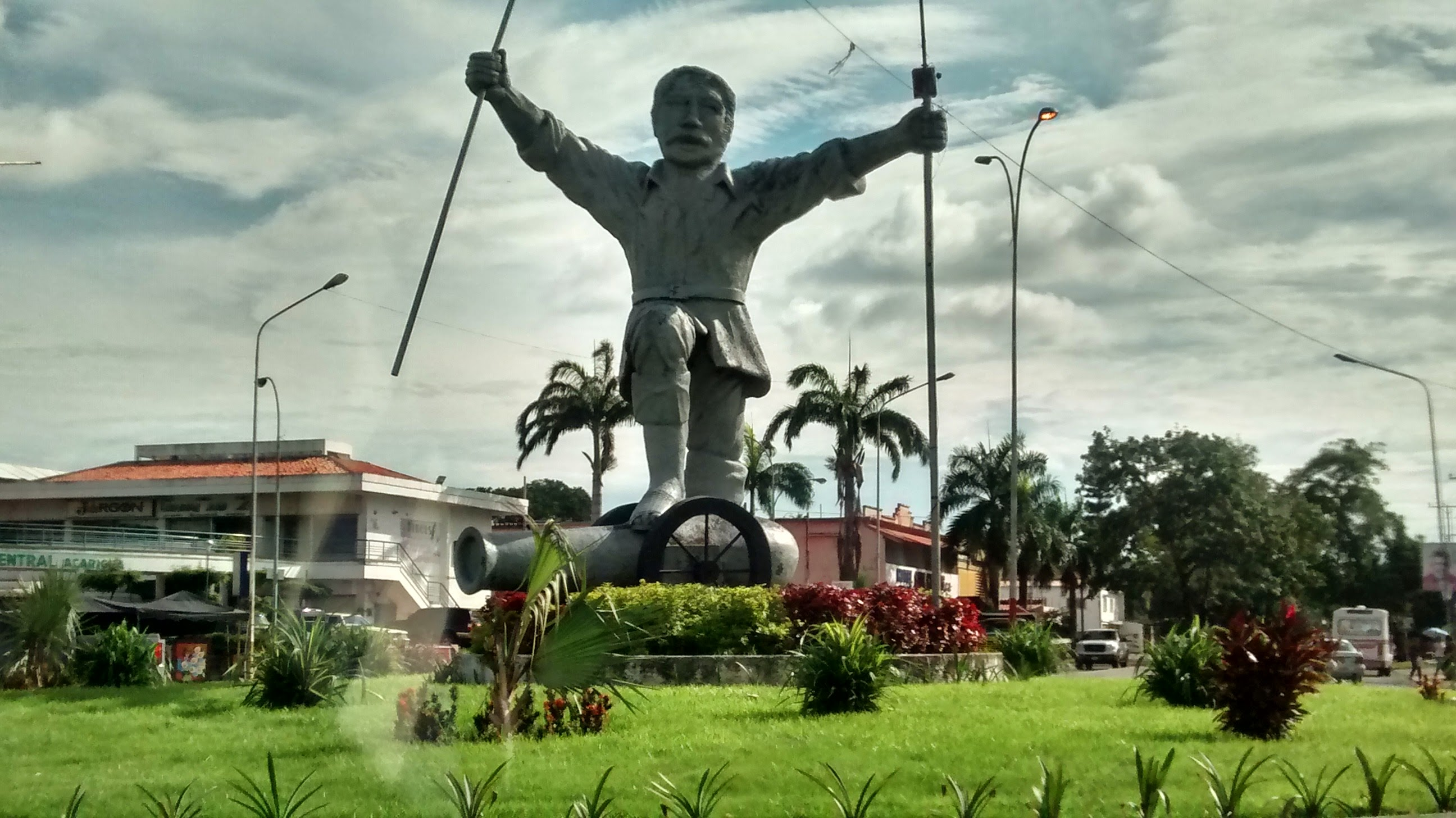 Acarigua, Portuguesa, Venezuela